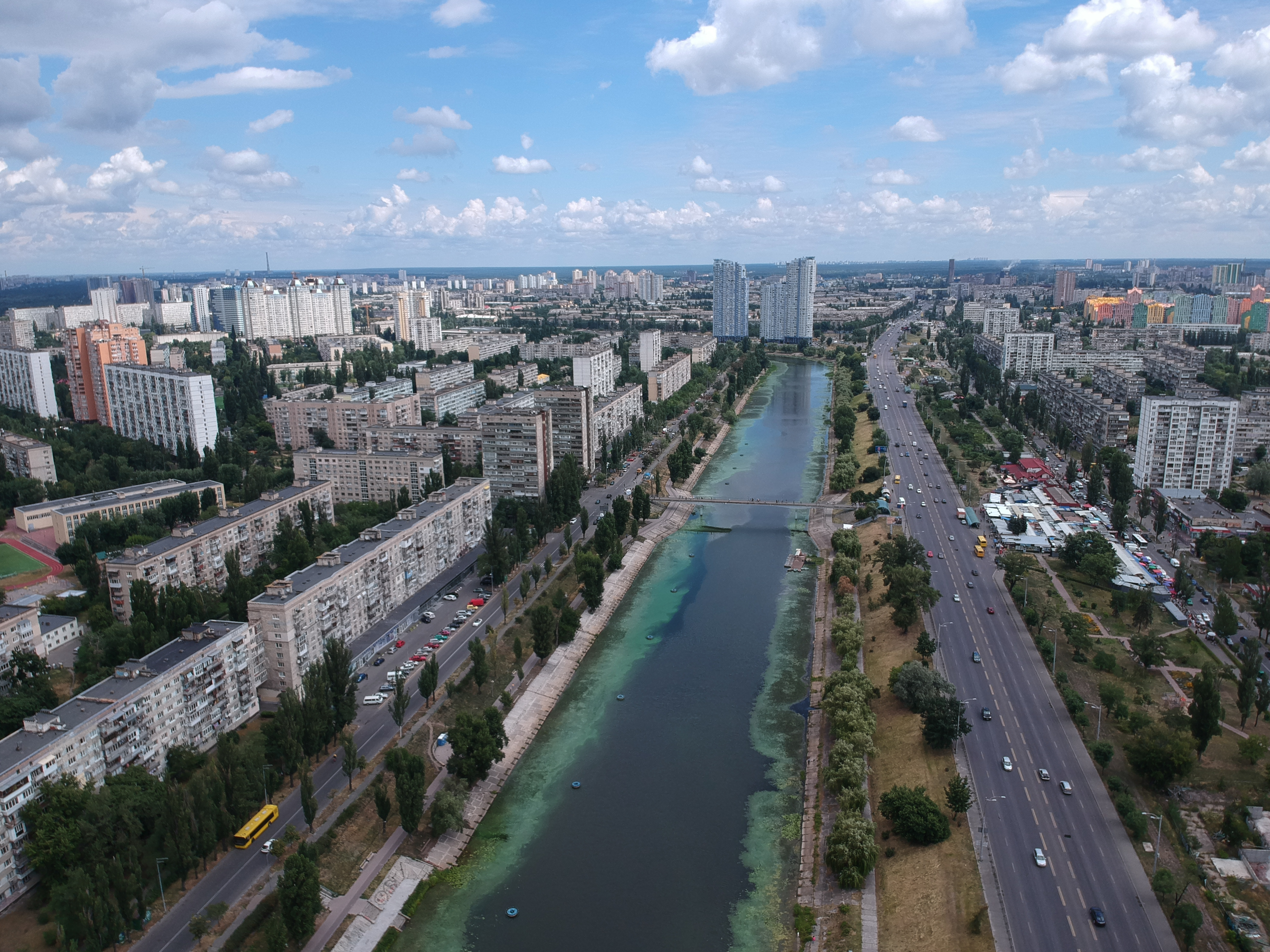 Русанівський канал, Київ